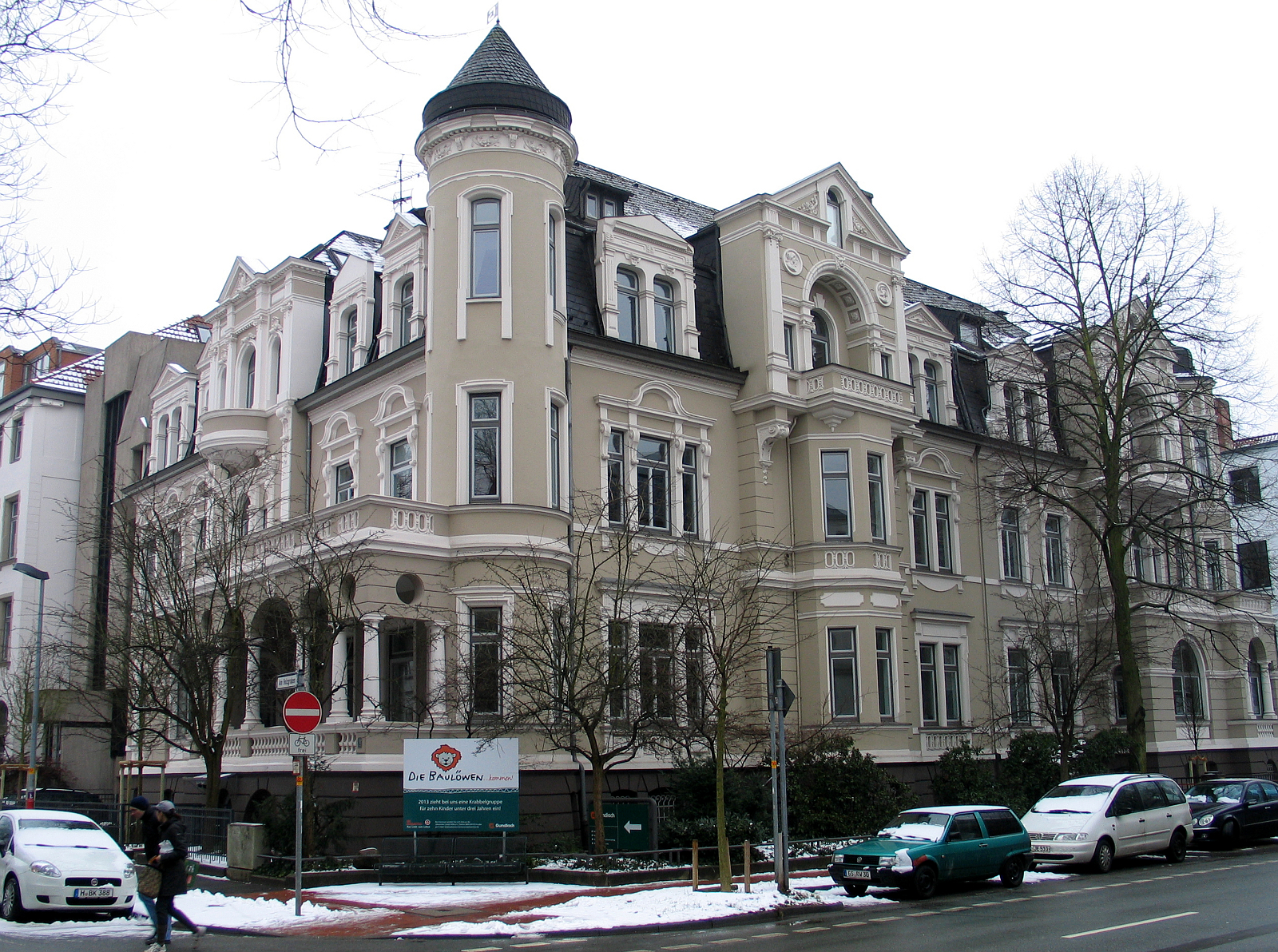 Blick im Winter auf die Villa Köhler, Am Holzgraben 1 und Wedekindstraße 14 und 15 in der Oststadt in Hannover. Von 1911 bis zum Ausbruch des Ersten Weltkrieges bewohnte hier Paul von Beneckendorff und Hindenburg das Hochparterre des Gebäudes ...